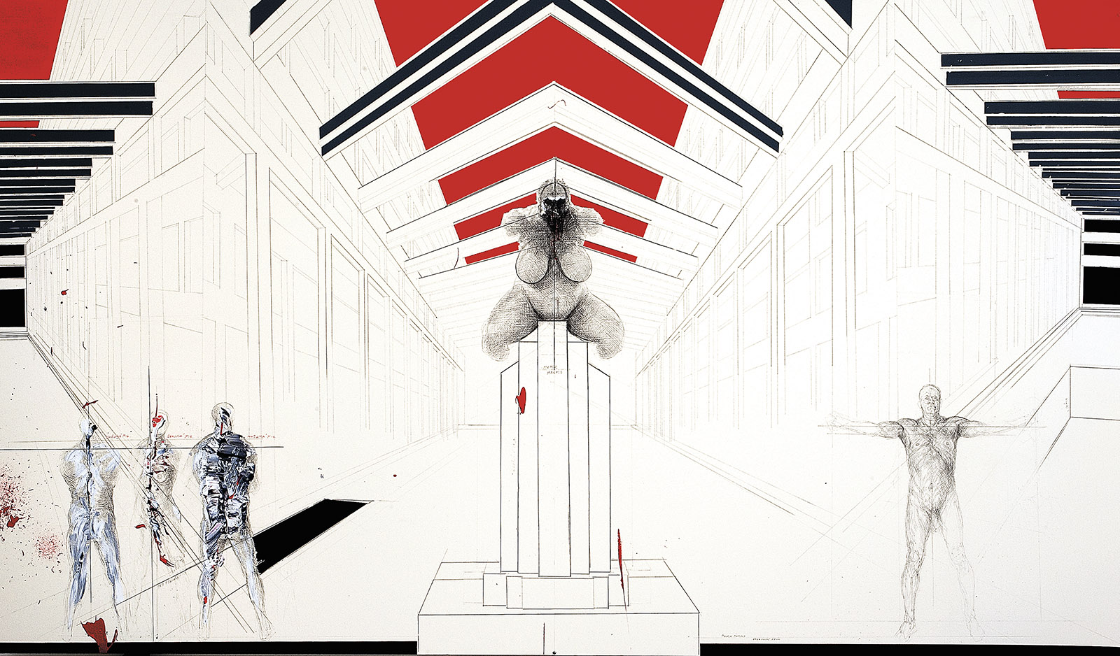 Jiří Sozanský, Pranýře (kresba, tužka, akryl) 140 x 240 cm, 2014